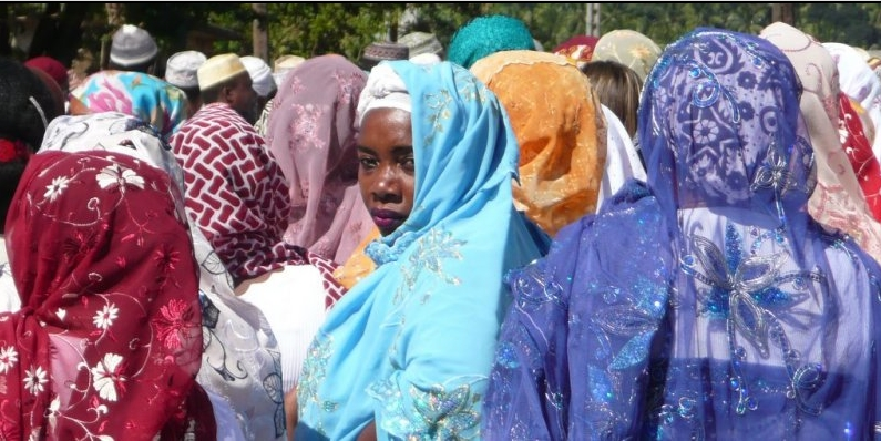 Mariage en couleurs This is an image of Cultural Fashion or Adornment from France